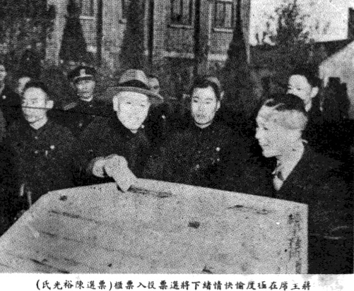 第一屆國民大會專輯圖片